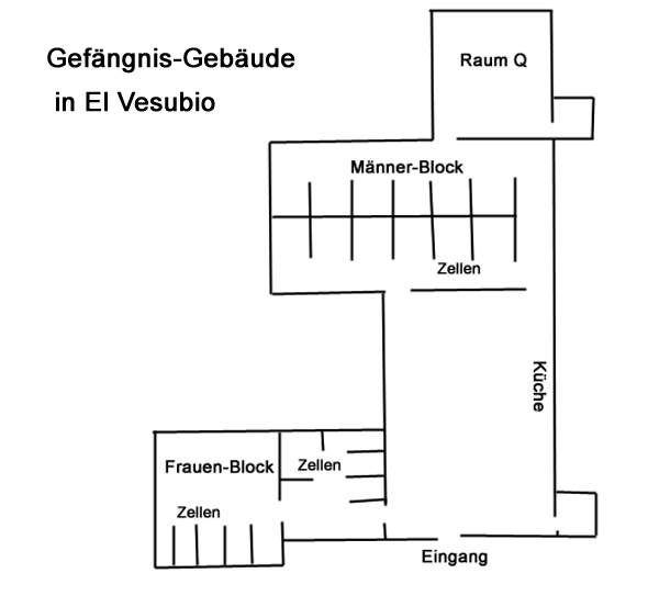 Grundrissplan Gefängnisgebäude (Casa 3) El Vesubio, nachgezeichnet nach Plan aus dem Nunca Más Bericht der Nationalen Kommission für verschwundene Personen (CONADEP). Eudeba, Buenos Aires, Dezember 1999. Seiten 174 und 171, jeweils.